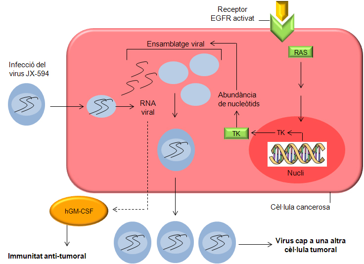 Les mutacions habituals en cèl·lules canceroses estimulen la replicació del virus oncolític modificat genèticament, JX-594.